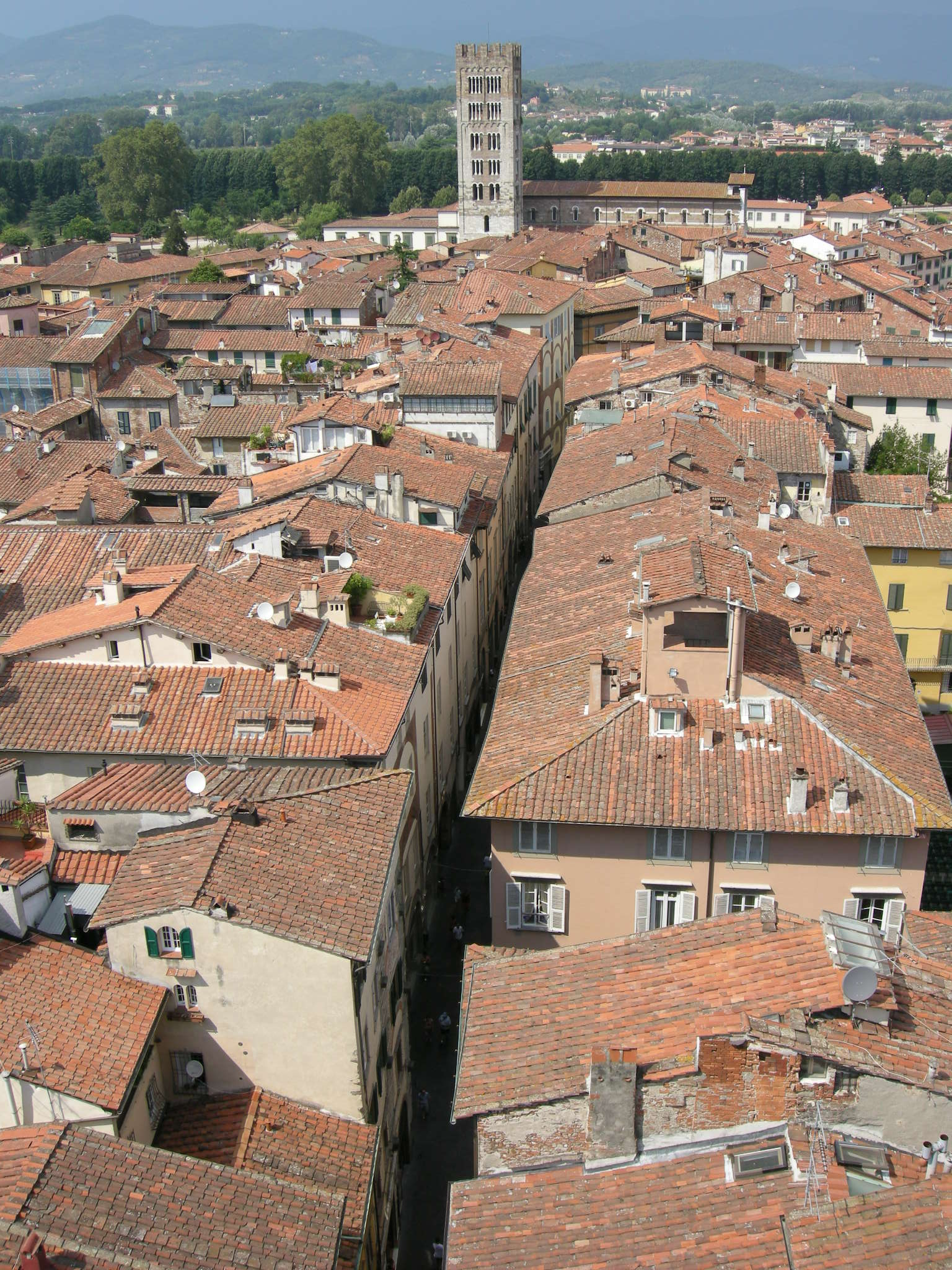 Torre dell'orologio, view 11 via fillungo, san frediano